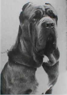 1978, Enea di Ponzano - Mastino Napoletano